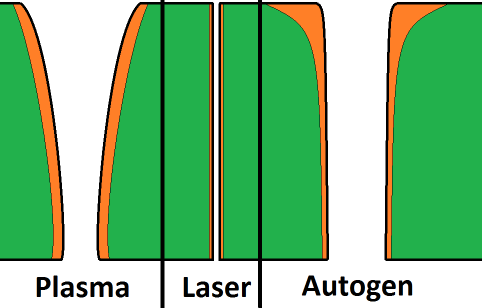 Querschnitte der Schnittfugen beim Plasma-Schmelzschneiden, Laserschneiden und Autogenem Brennschneiden.